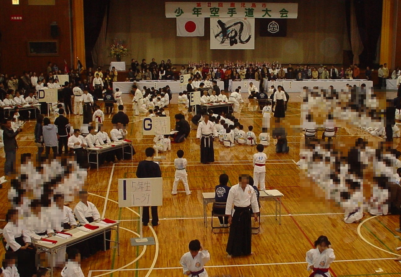 全日本少林寺流空手道連盟錬心舘鹿児島市少年空手道大会の様子。